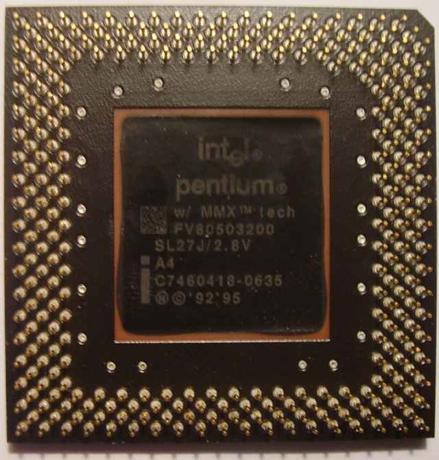 Intel Pentium MMX